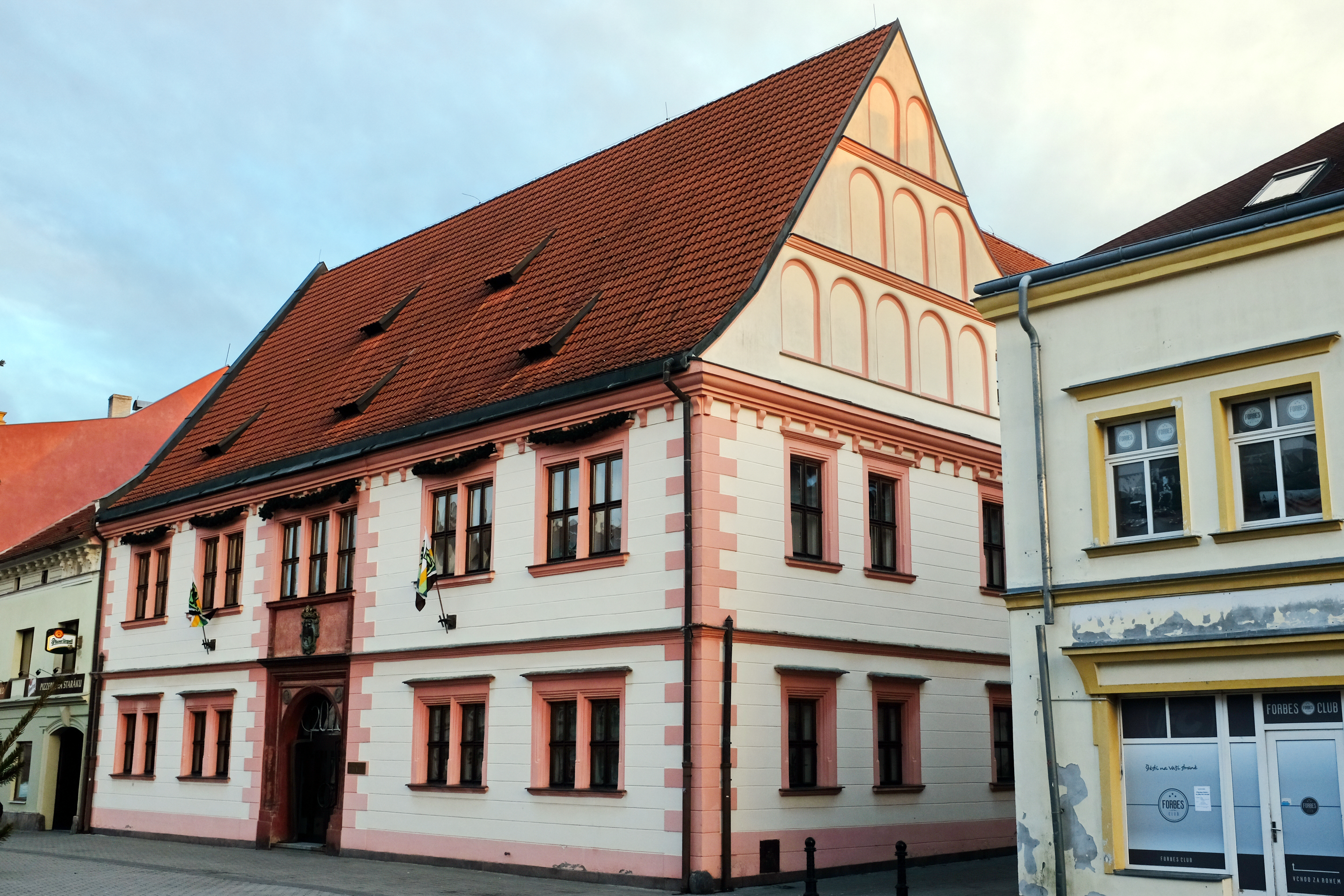 Radnice, Staré náměstí 69, Sokolov.